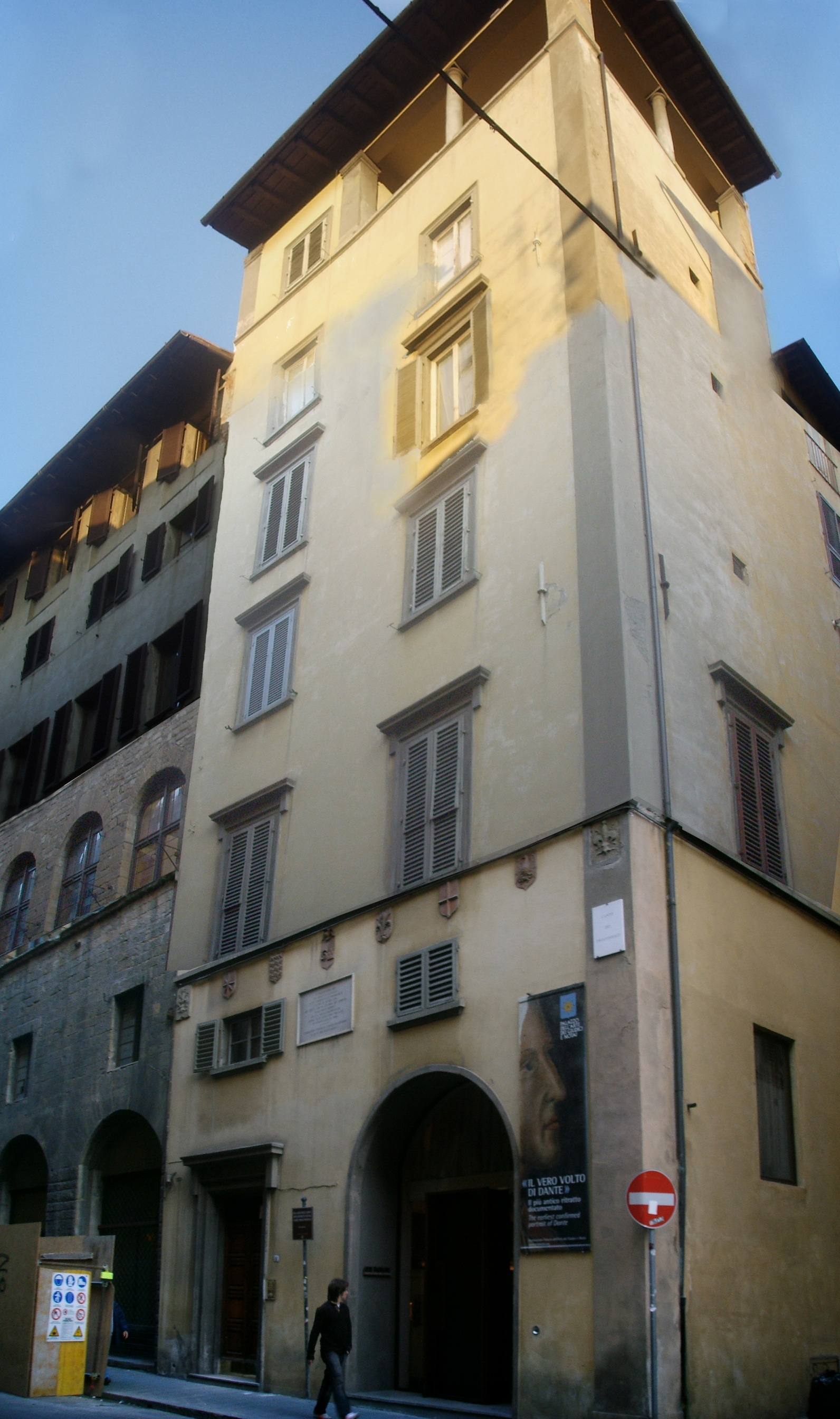 Palazzo dei Giudici exterior in Florence, Italy